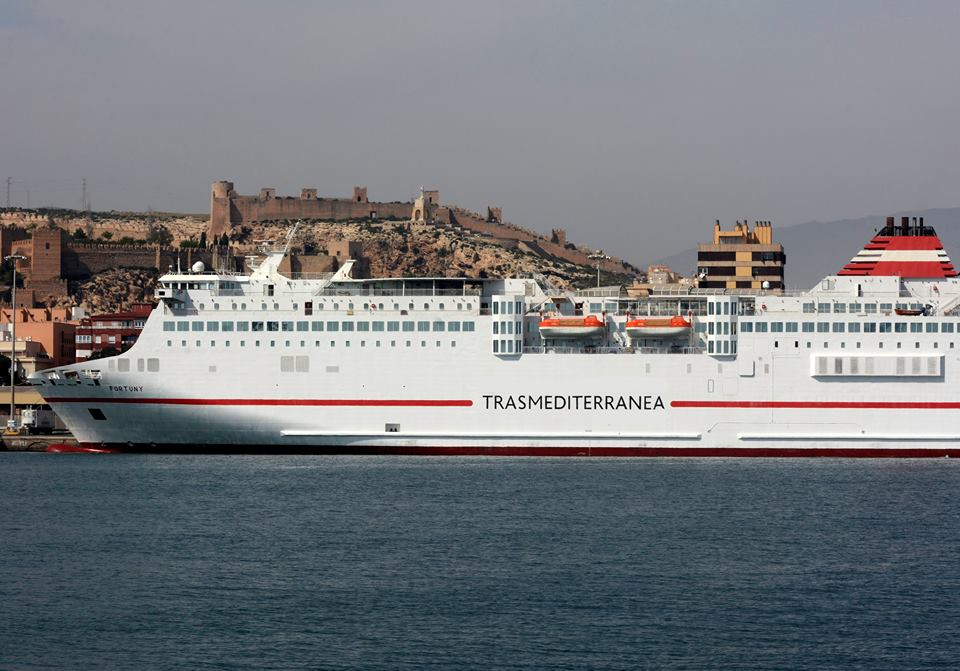 Buque Fortuny